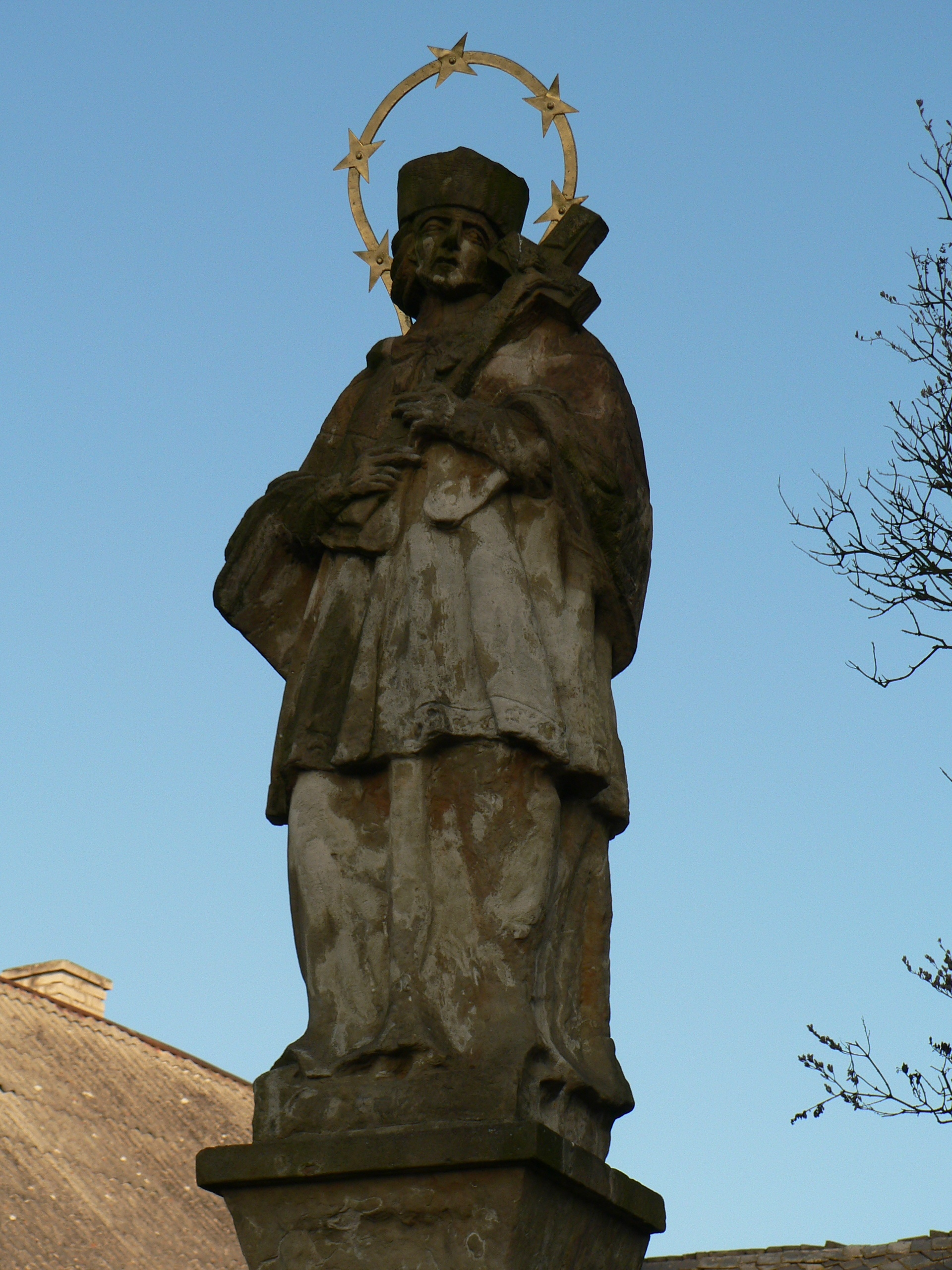 Dlouhomilov, okres Šumperk, empírová socha sv. Jana Nepomuckého (1839)